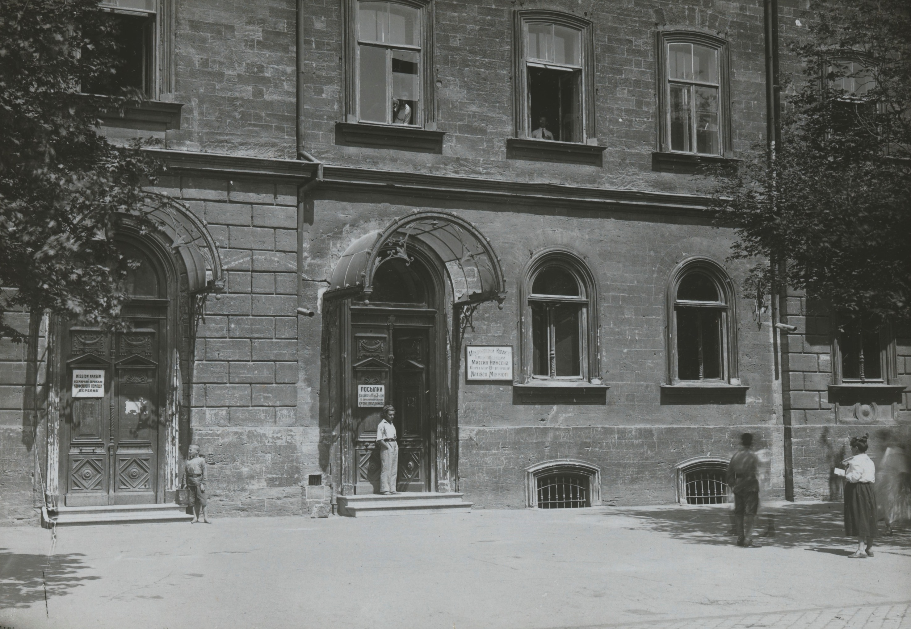 Inngangen til kontoret for Nansenmisjonen i byen. Depicted place: Ukraina, Odessa